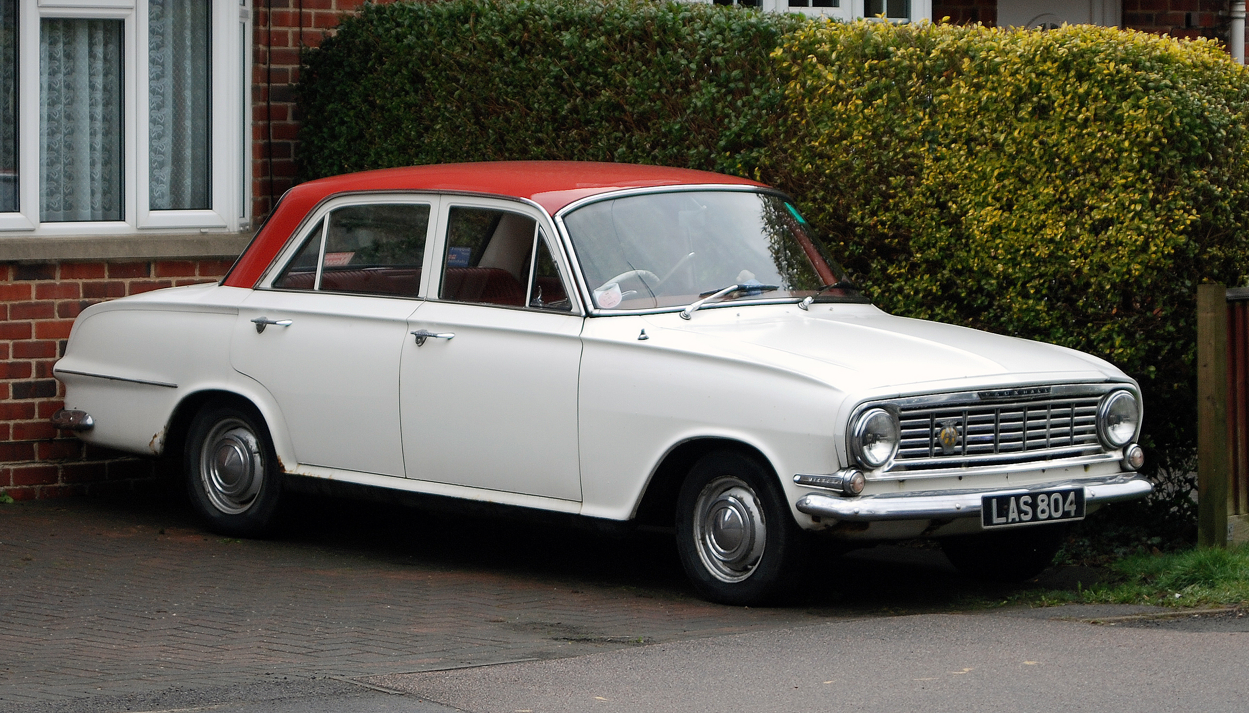 Redhill,Mar 2009